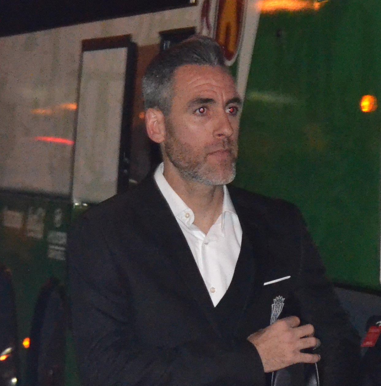 O futbolista Abel Gómez Moreno